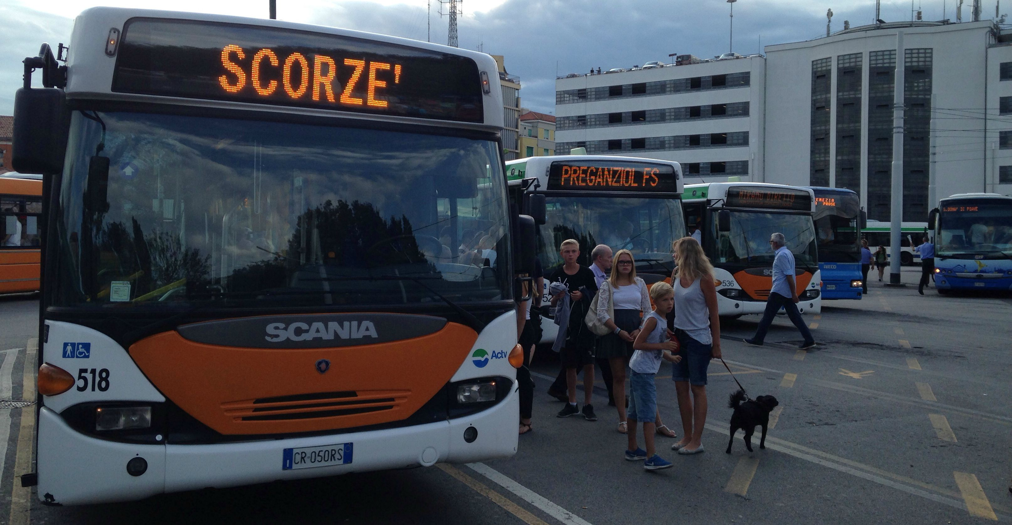 Autobus ACTV in Piazzale Roma a Venezia: -Scania OmniCity 518 Extraurbano per Scorzè; -Scania OmniCity 529 Extraurbano per Preganziol FS; -Scania OmniCity 536 Extraurbano diretto Mirano